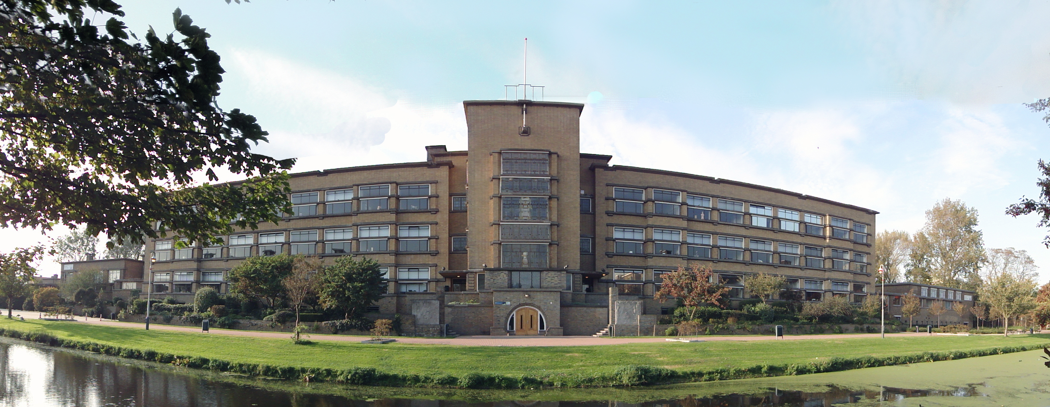 Daltoncollege